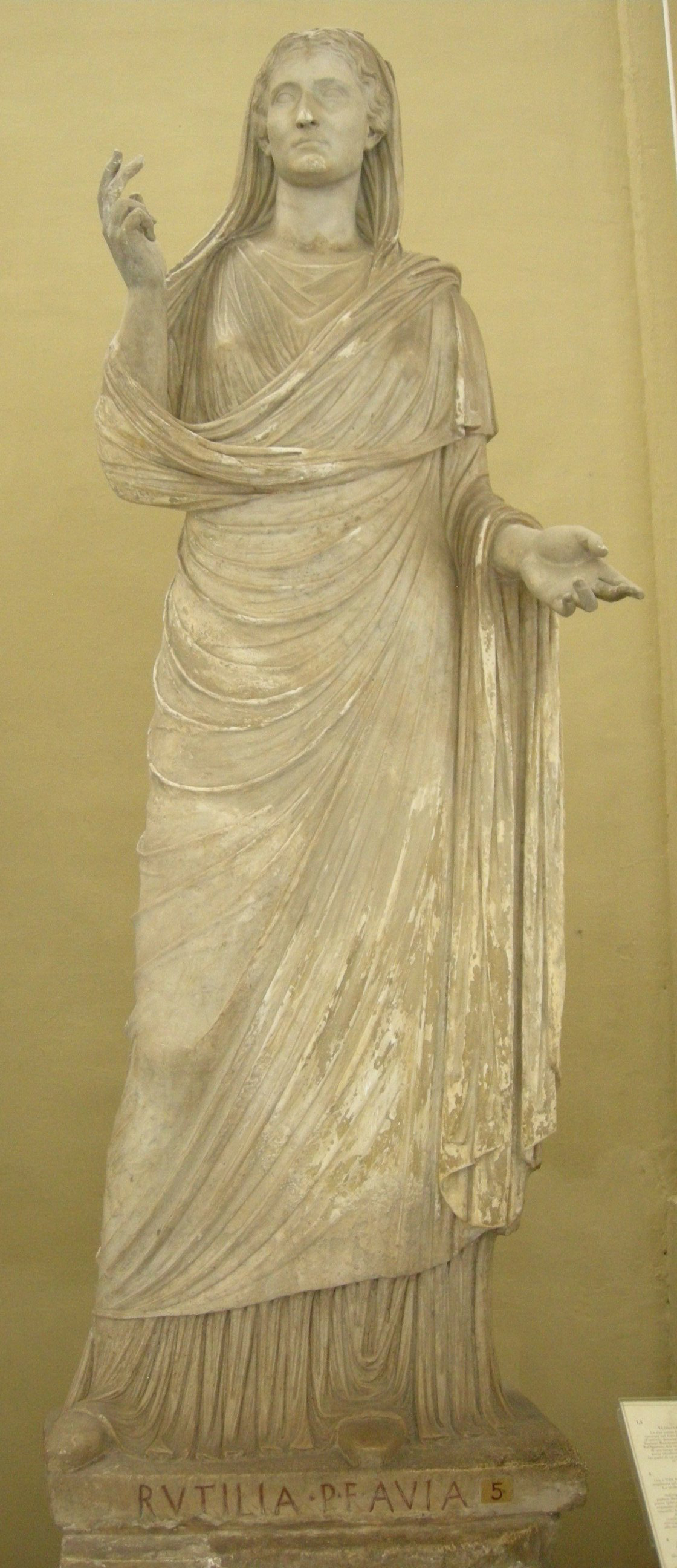 Statua iconica femminile della Gens Rutilia, da Tusculum. Museo Chiaramonti, Vaticano.